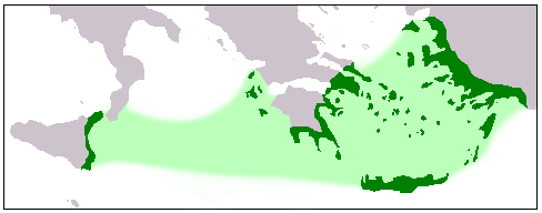 Este archivo fue creado copiando de wikicommons Image:BlankMap-World.png y luego editado en el programa paint. fue hecho por y a la hora--Mexicano 18:35 23 abr 2006 (CEST)